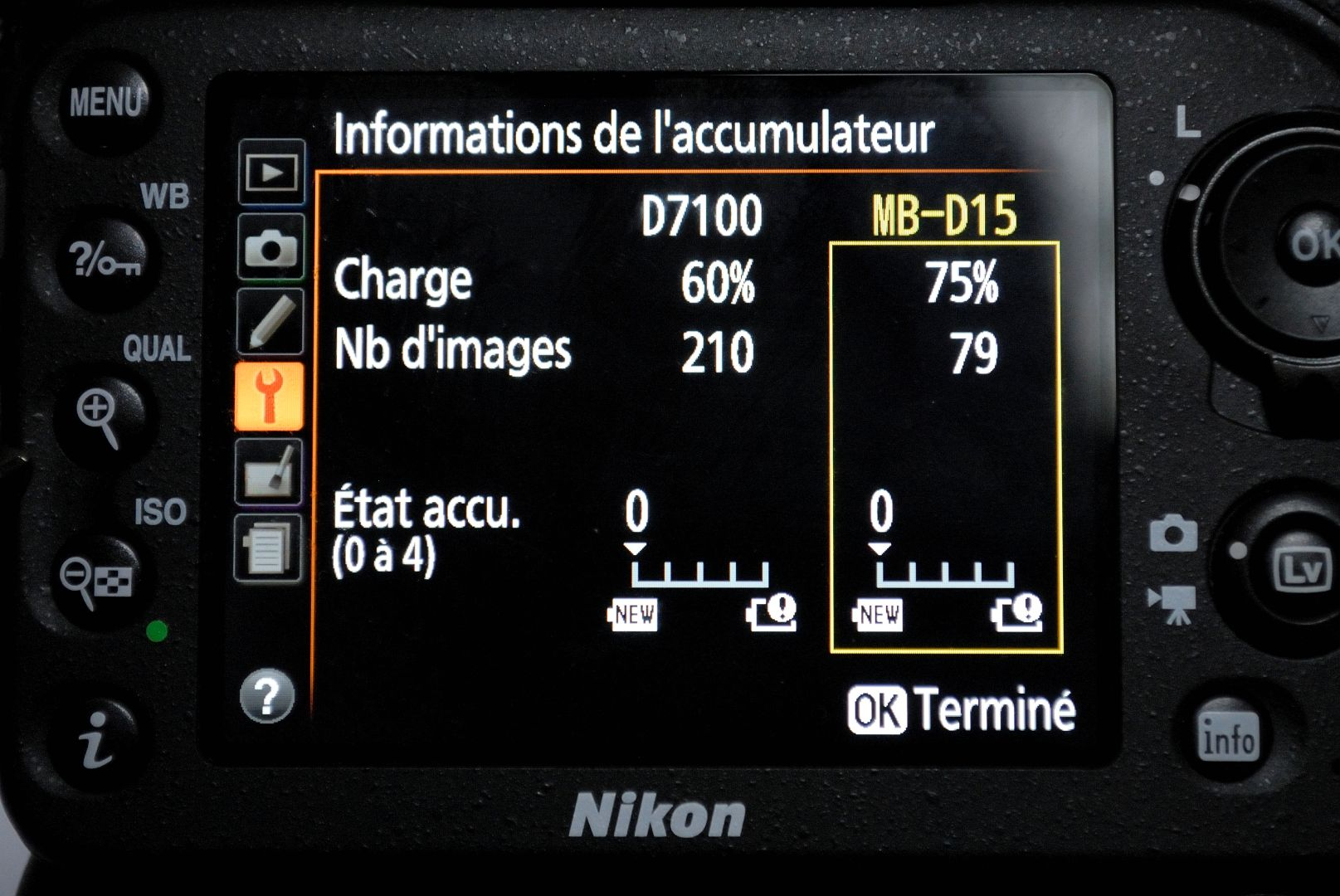 Informations batteries sur un Nikon D7100